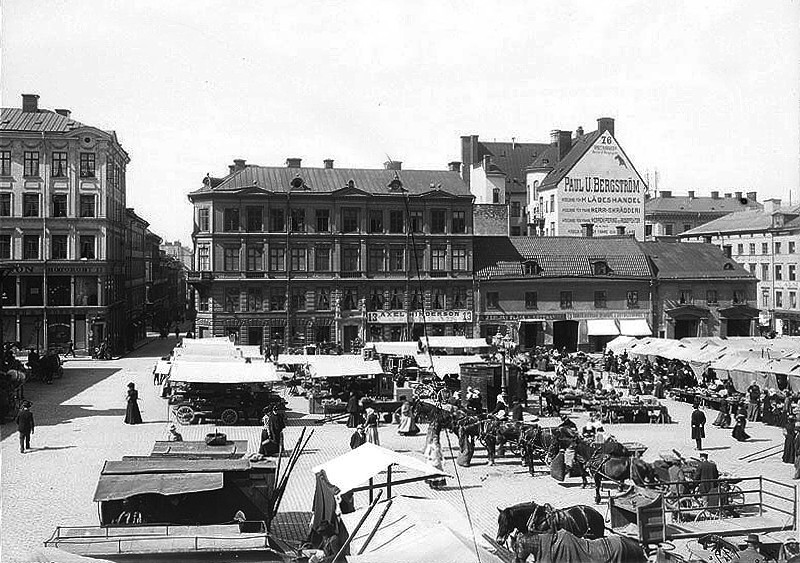 Hötorget år 1902 mot kvarteret vinkelhaken